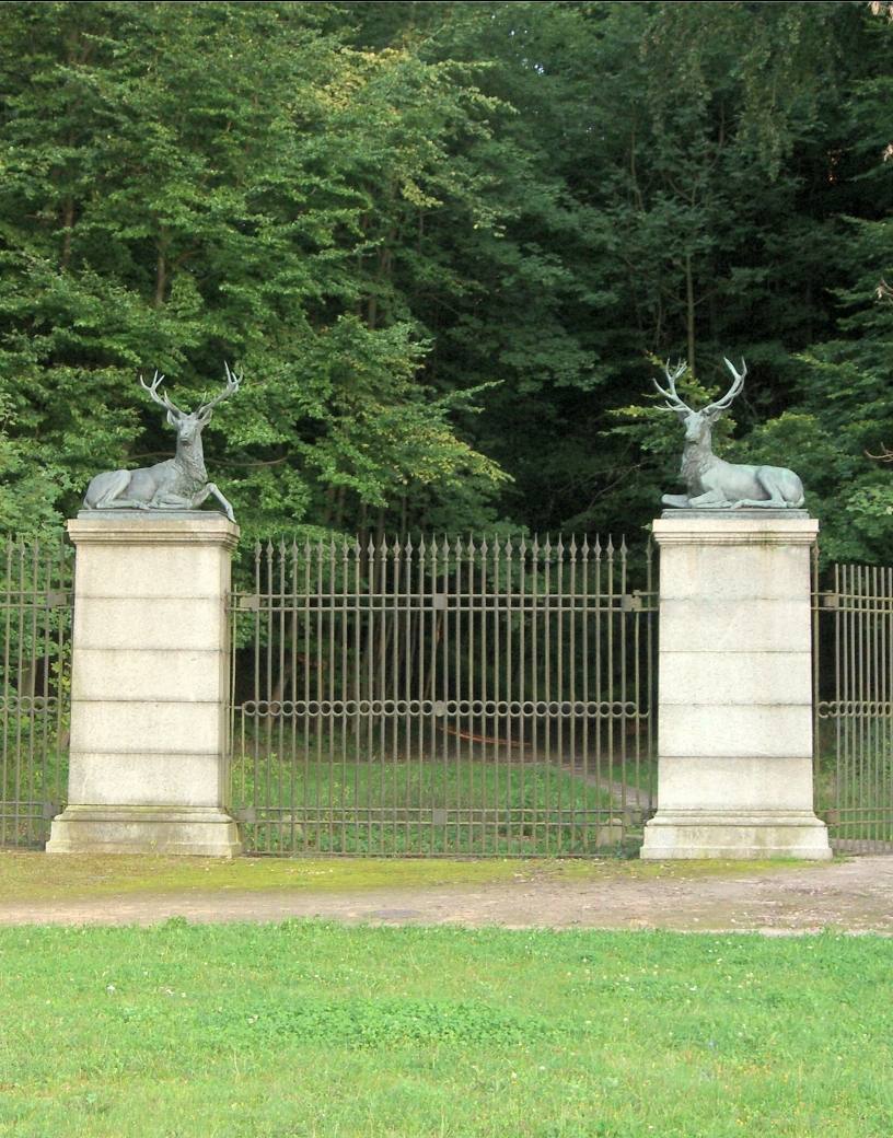 Hirschportal bzw. Hirschtor zum Tiergarten Neustrelitz, Mecklenburg-Strelitz, MV